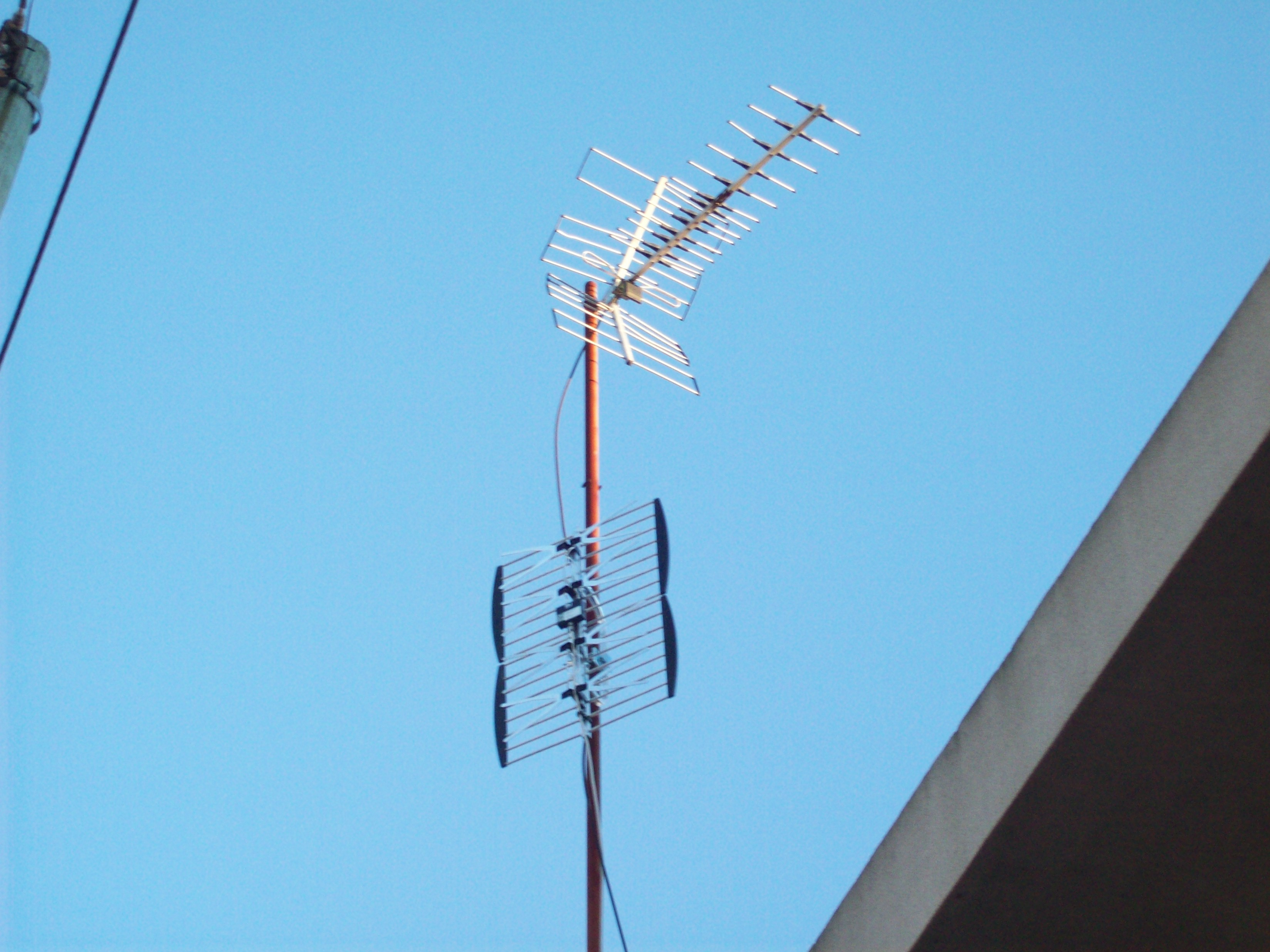 Antena de televisión digital abierta, arriba otra antena de UHF.